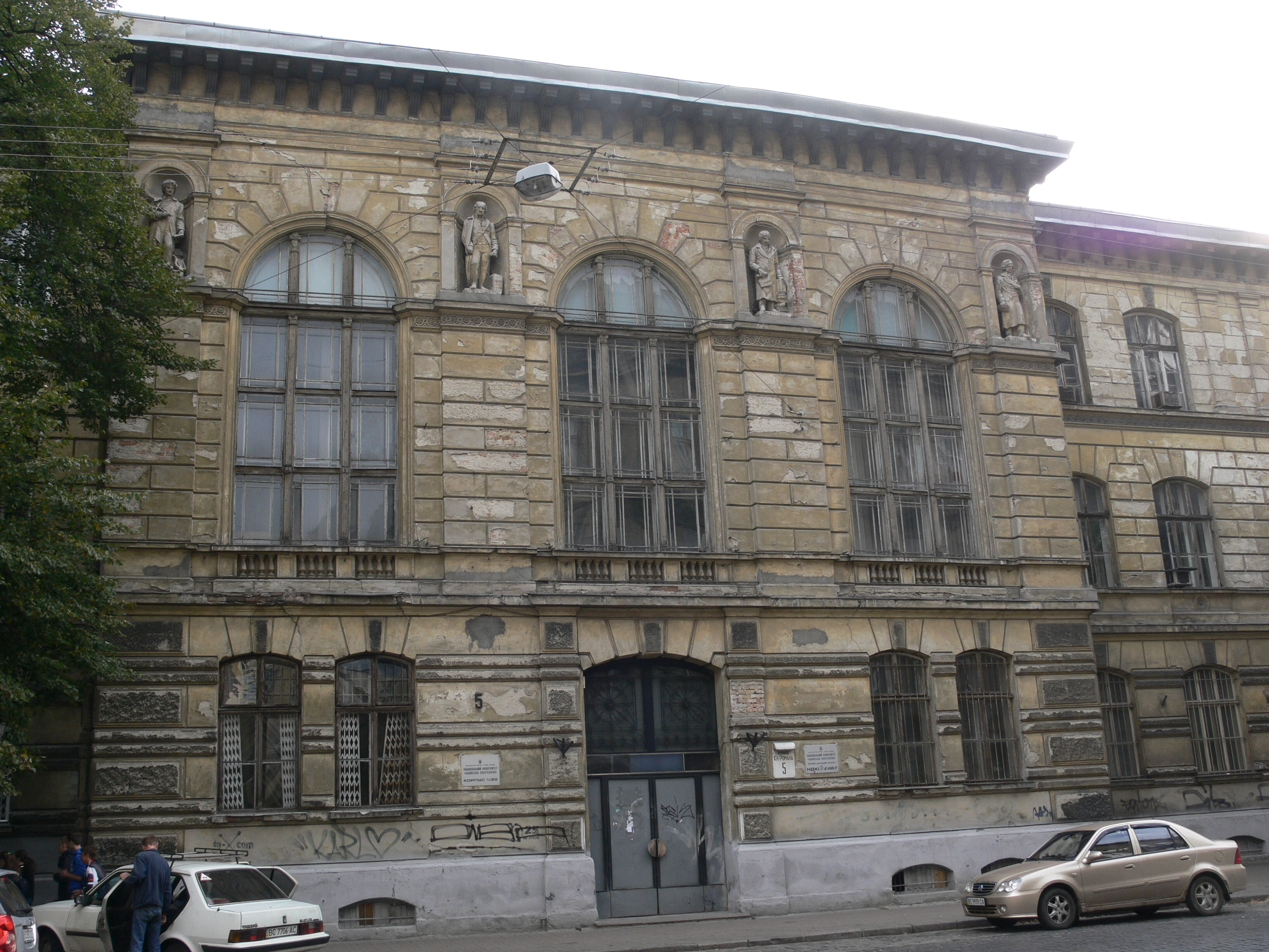 корпус університету "Львівська Політехніка"